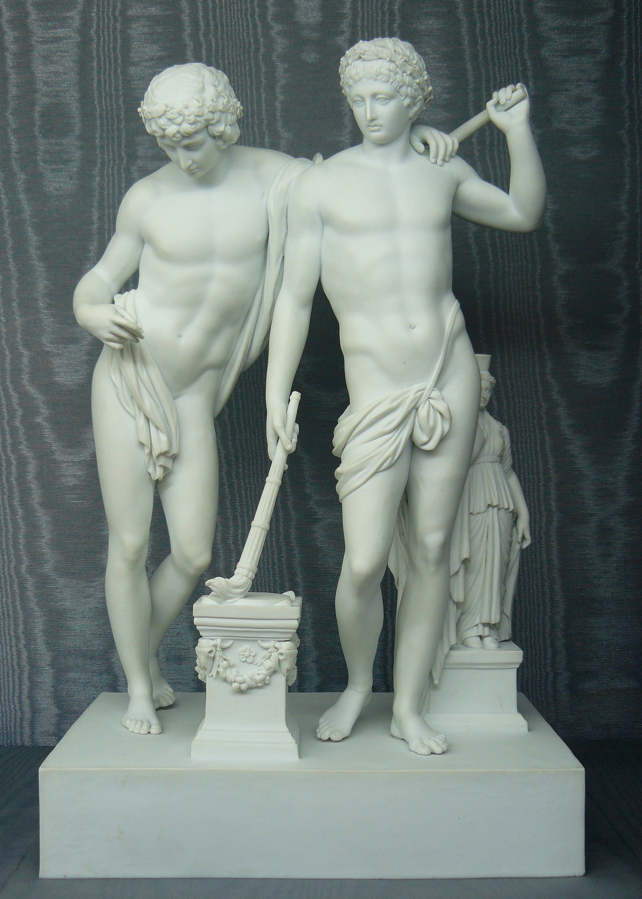 Copie à échelle réduite du groupe de San Ildefonso représentant Castor et Pollux. Biscuit de porcelaine dure de Sèvres, vers 1796, hauteur environ 40 cm. Musée national de céramique, Sèvres (Hauts-de-Seine, France). Inv n° MNC 469.